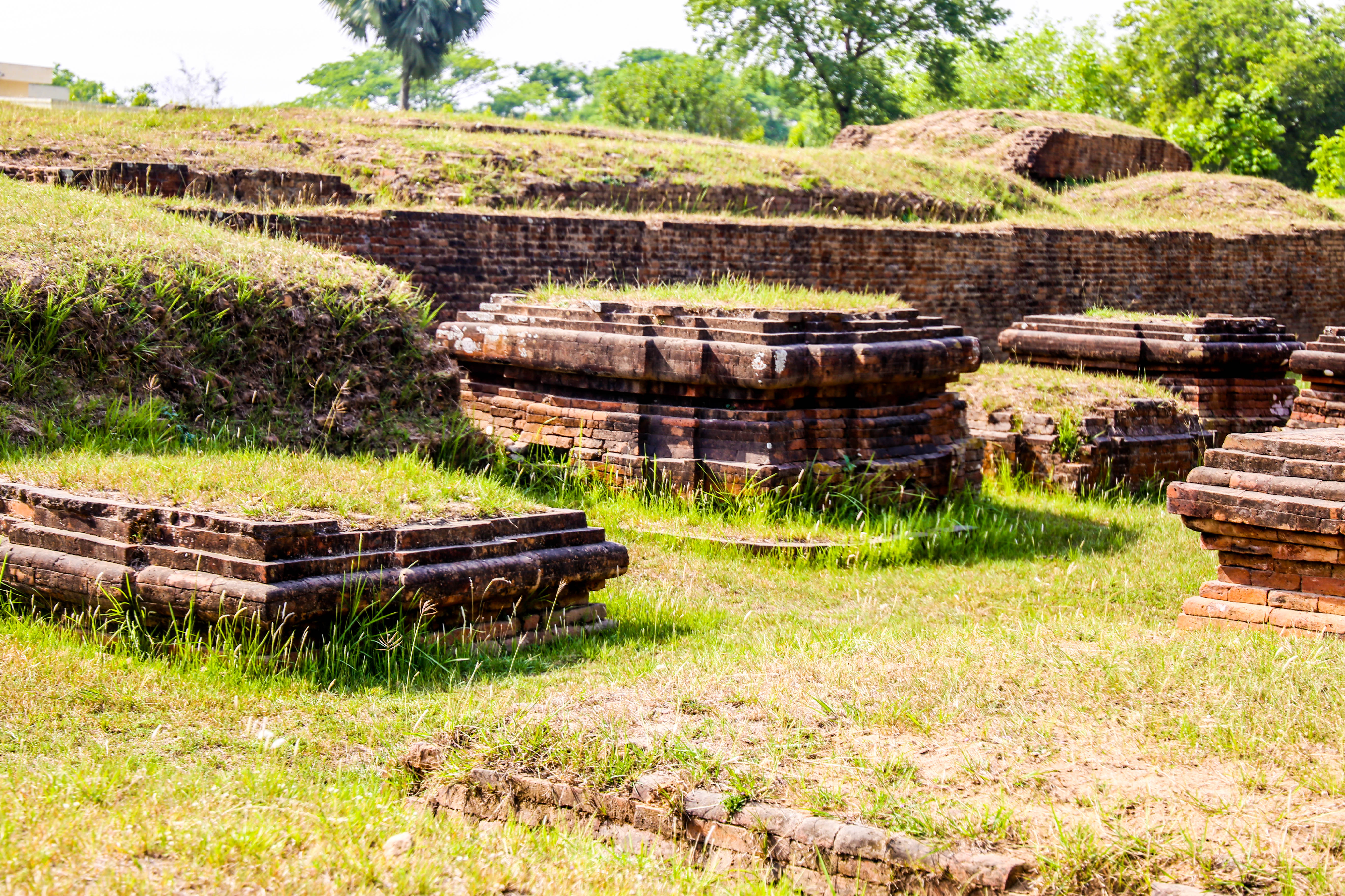 সত্য পীরের ভিটা নওগাঁ জেলার বদলগাছি থানার পাহাড়পুর ইউনিয়নে পাহাড়পুর যাদুঘরের পাশে অবস্থিত। এটি সোমপুর বা পাহাড়পুর বিহারের একটি অংশ।